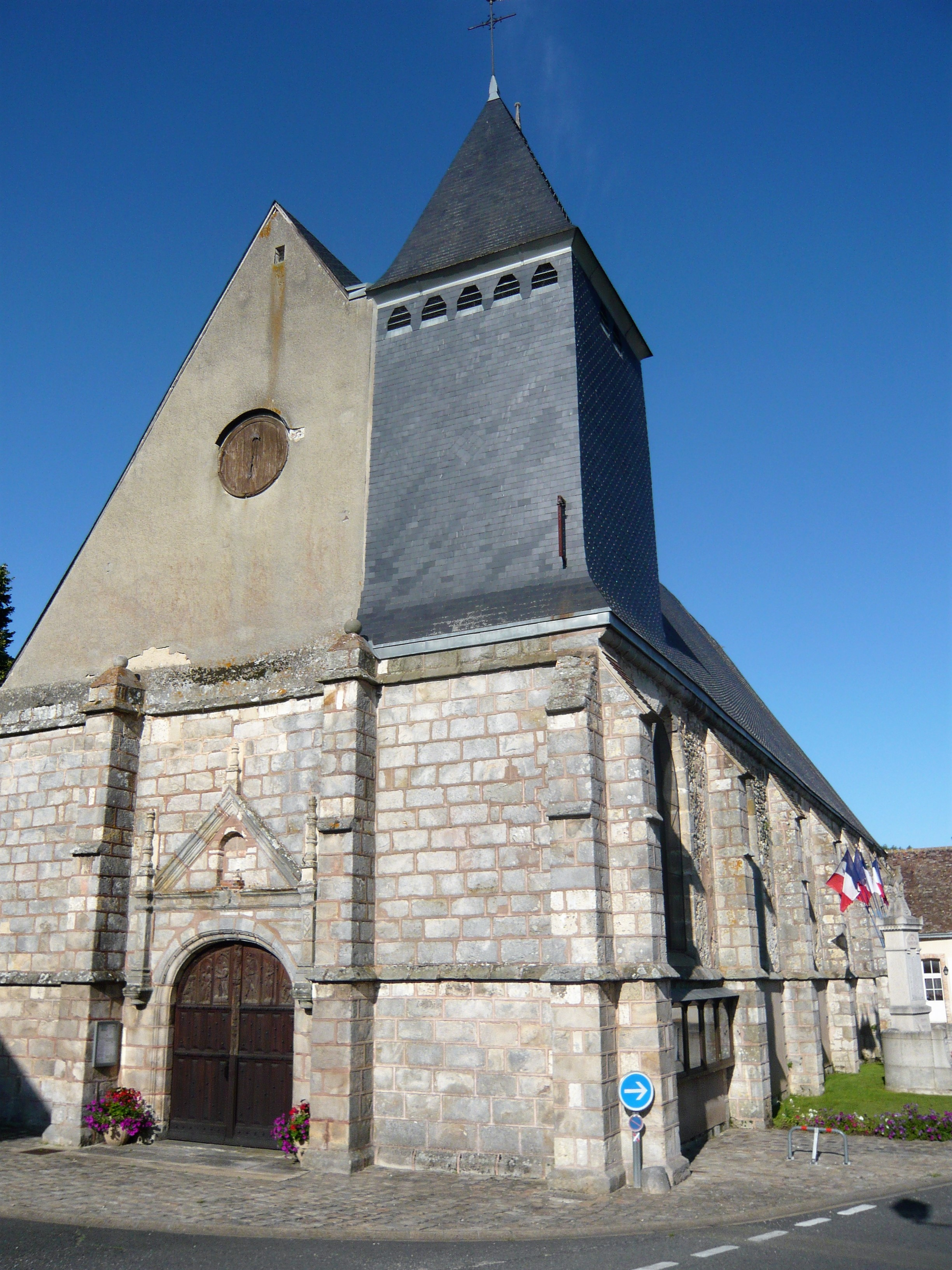 Façade ouest et mur sud de l'église Saint-Piat, Saint-Piat, Eure-et-Loir, France.